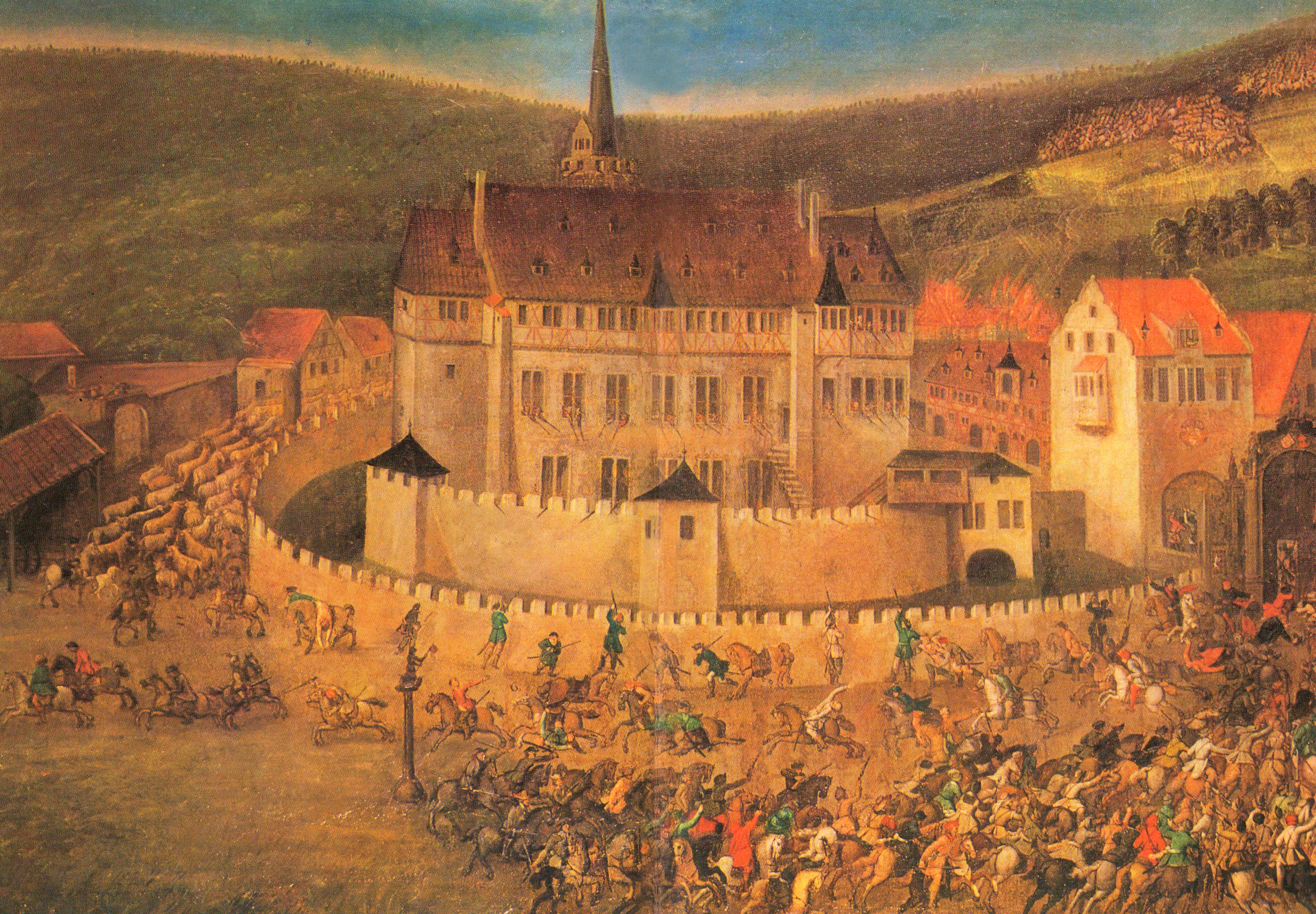 Angriff kroatischer Reiterei auf das Schloss Erbach am 22. Mai 1623